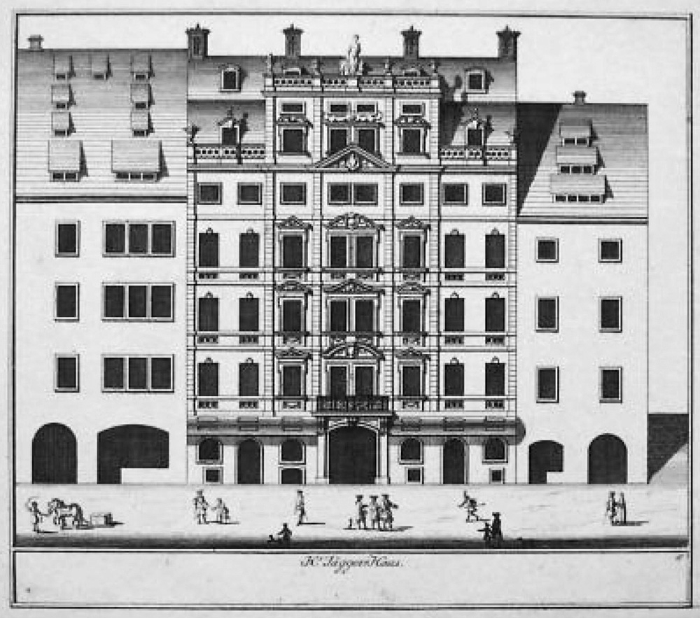 Jöchers Haus in Leipzig um 1710 - noch ohne die Balkonfiguren